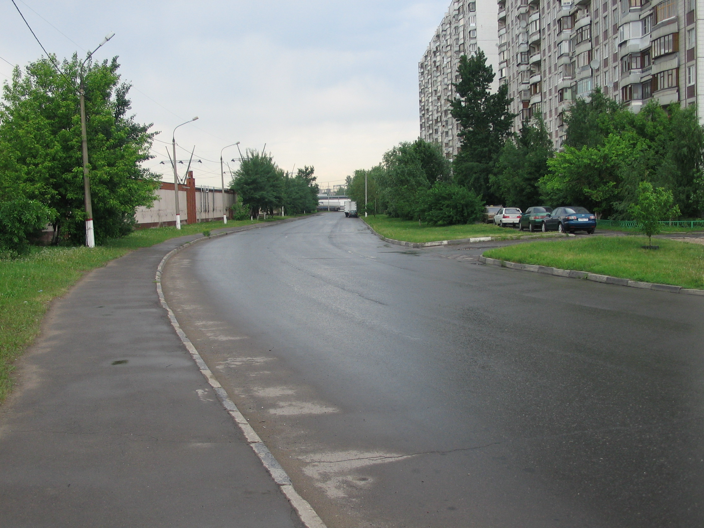 Молодёжная улица города Реутова.